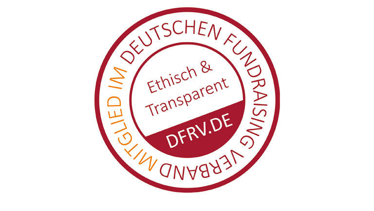 Logo von Deutscher Fundraising-Verband